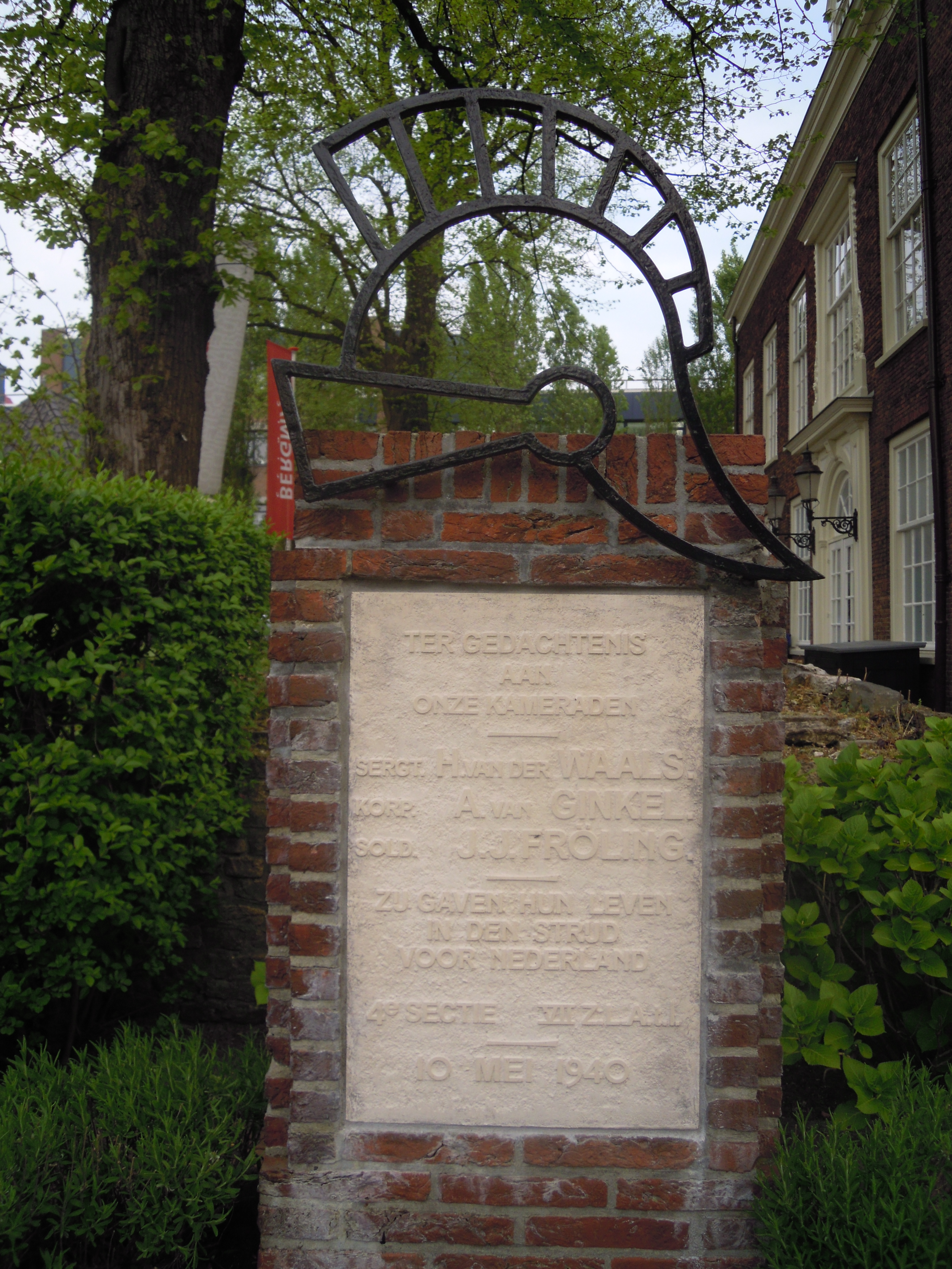 Oorlogsmonument Binckhorst, dit monument staat achter het Kasteel De Binckhorst aan de binkhorstlaan 145-149. Monument voor drie militairen van de Zoeklichtafdeling die sneuvelden in de meidagen van 1940. Op dit detail zijn de namen van de gesneuvelden te lezen. De volledige beschrijving is op Wikipedia te vinden onder de naam van de ontwerper, Sgt. H. van Lennep.